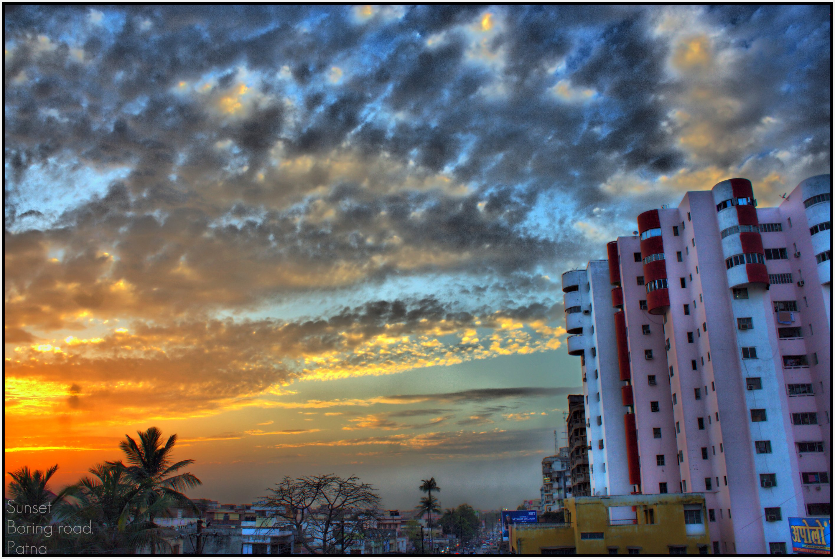 Boring road,Patna